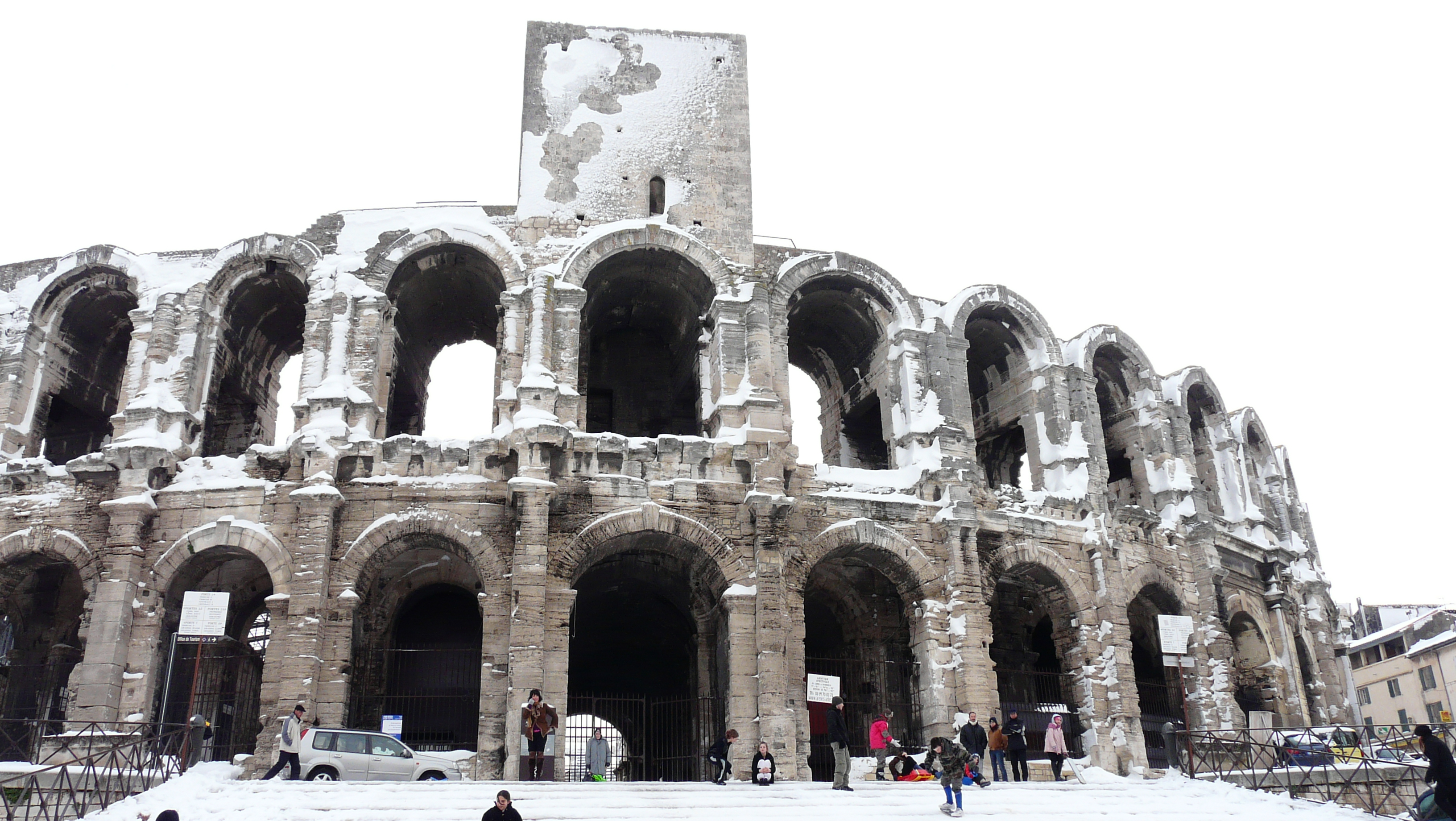 Amphithéâtre d'Arles sous la neige.